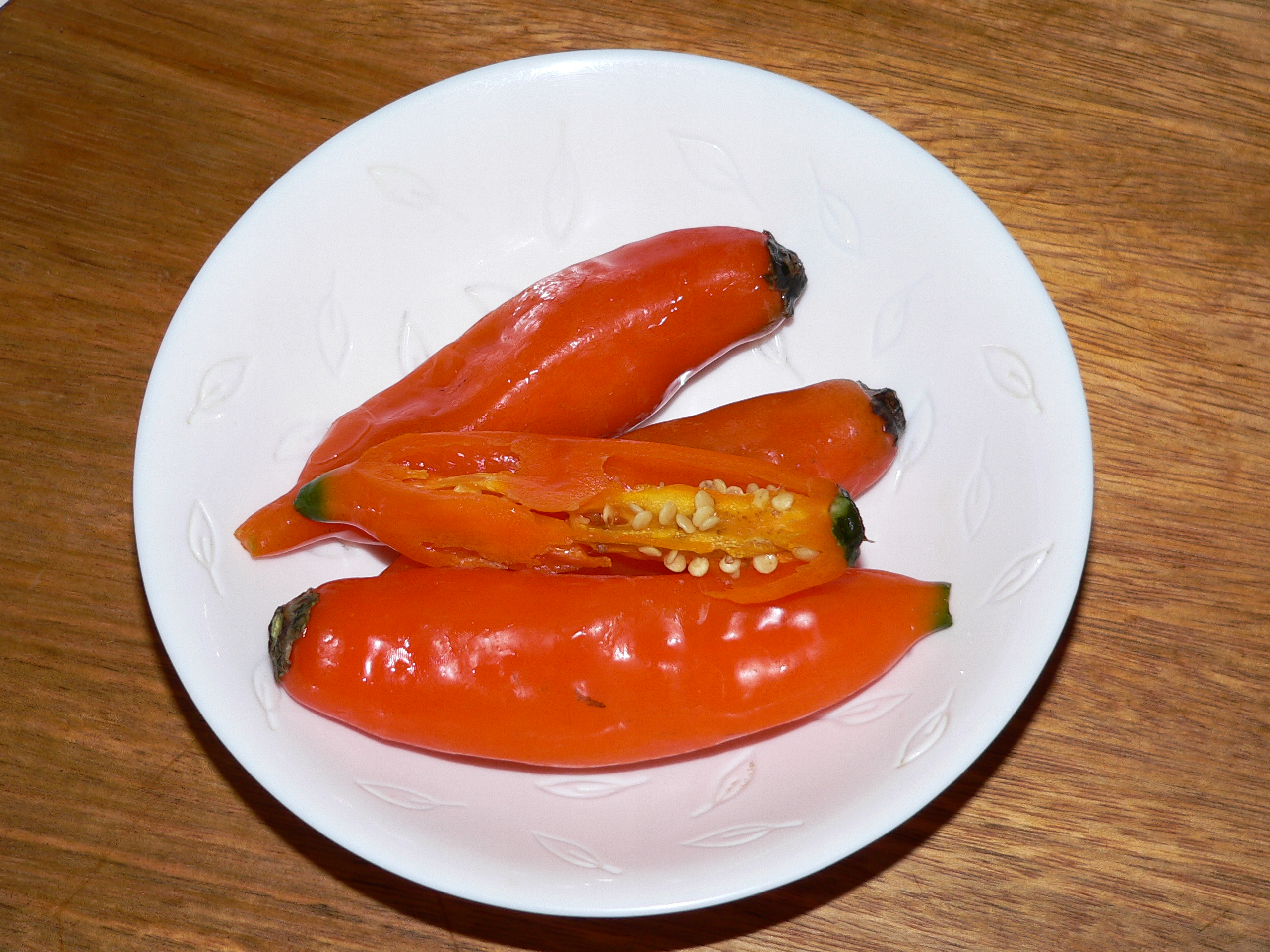 Descripción: Gastronomía del Perú Nombre: Ají peruano País : Perú Fotógrafo: © Manuel González Olaechea y Franco Fecha : 11 de Noviembre de 2007